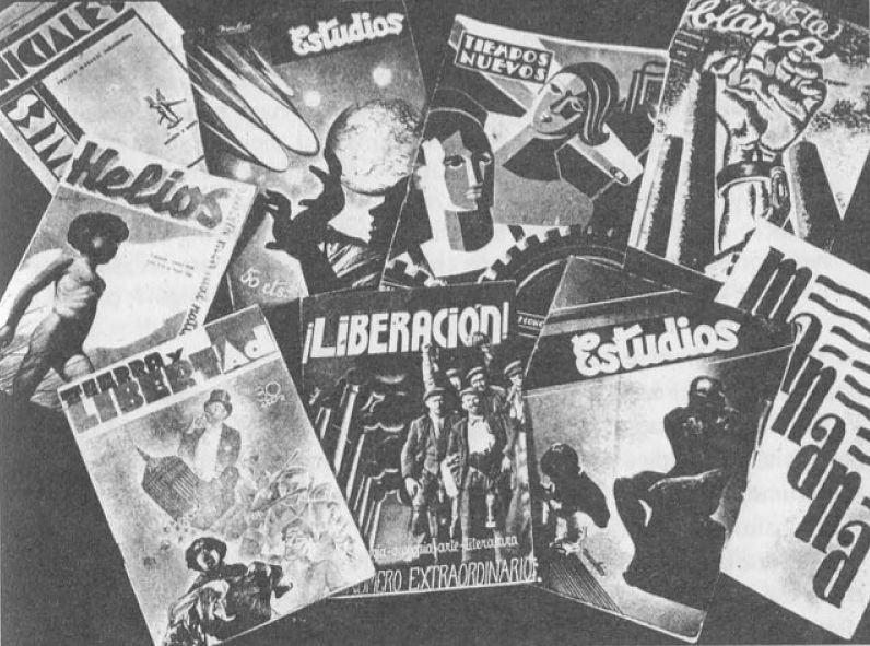 Anarchisme en Espagne. La presse a joué un rôle important dans la diffusion des idées libertaires en Espagne : un échantillon de publications associées à la Confédération nationale du travail (Espagne) et à la Fédération anarchiste ibérique.